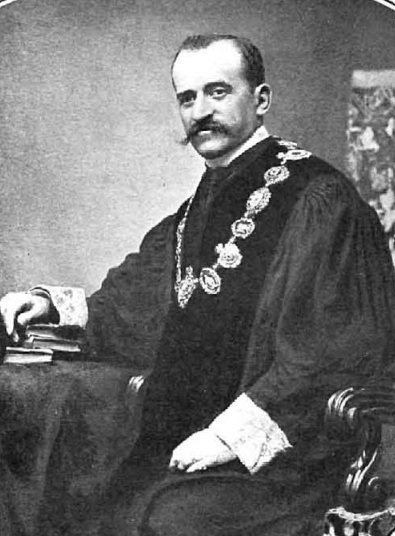 Álvaro Figueroa y de Torres Mendieta y Romo, de Kaulak